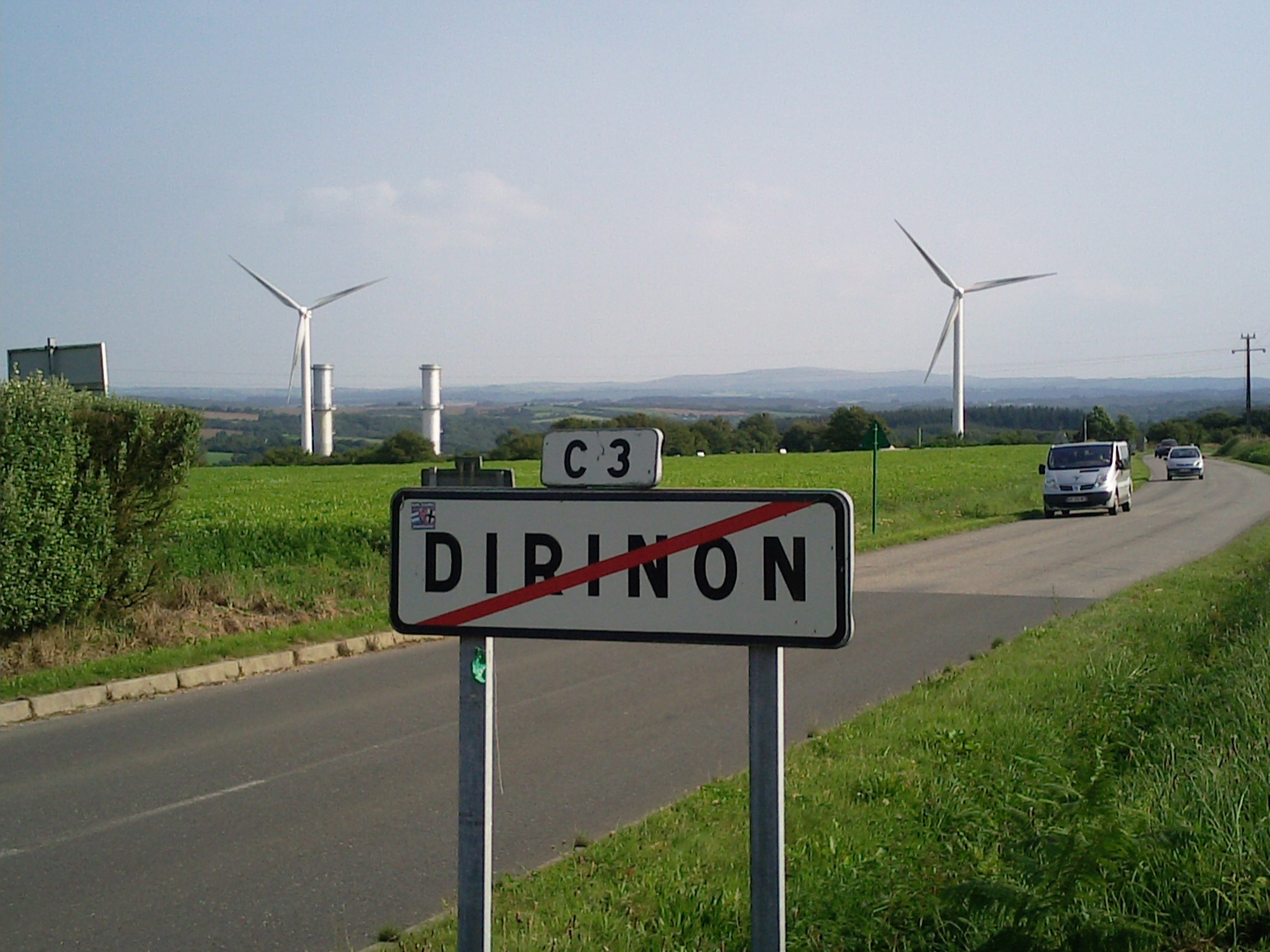 Panneau de sortie de la commune de Dirinon avec les éoliennes en arrière plan